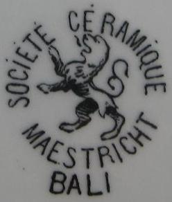 Merk Société Céramique daterend uit ca. 1870-1895.